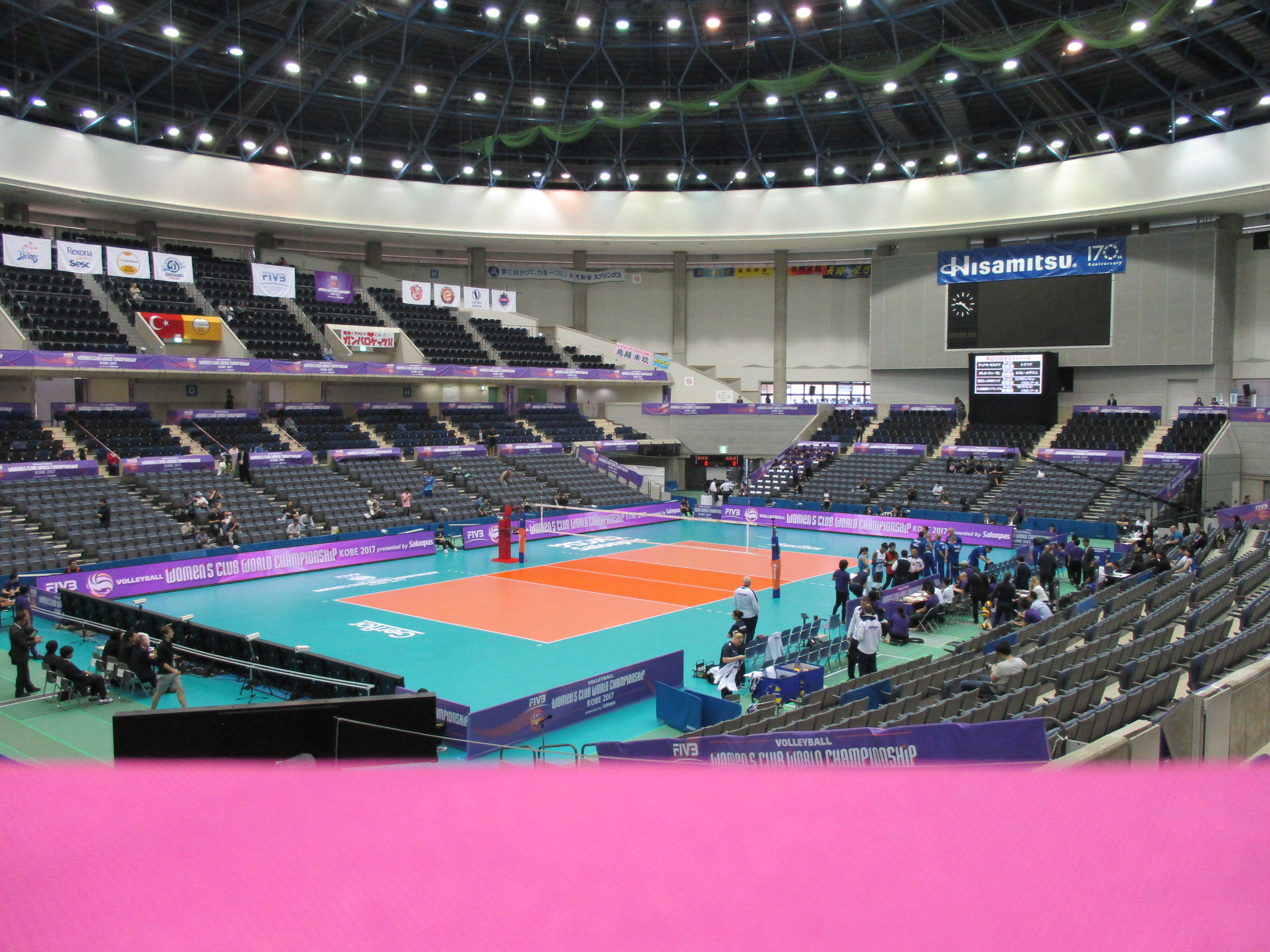 グリーンアリーナ神戸のアリーナ部